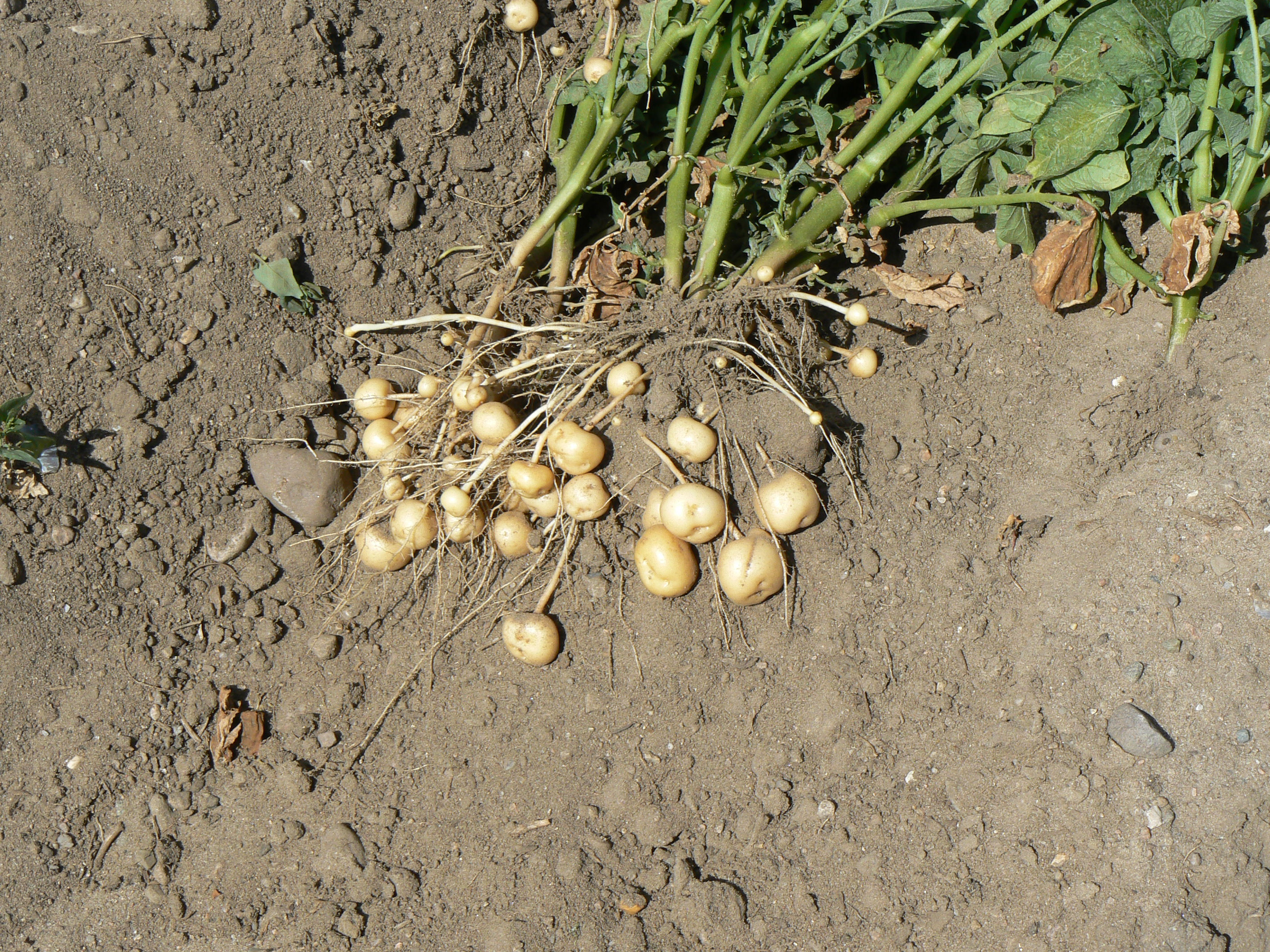 In der Nacht vom 7. Juli auf den 8. Juli haben unbekannte Täter eine etwa ein Hektar große Fläche des Amflora-Kartoffelfeldes in Zepkow, Mecklenburg-Vorpommern, zerstört.